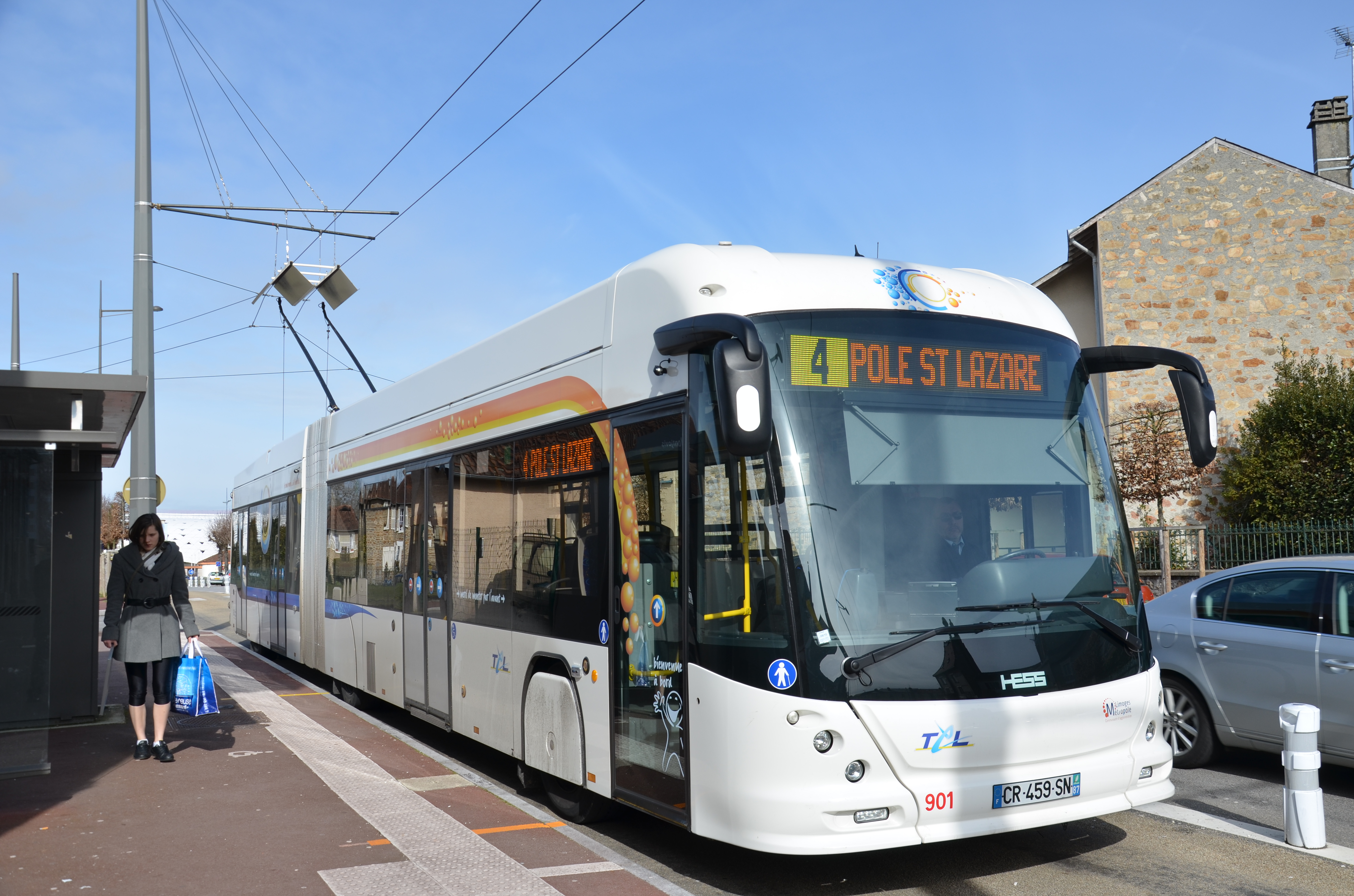 Hess Swisstrolley 4 n°901 sur la ligne 4 du réseau TCL de Limoges, à son terminus Montjovis.